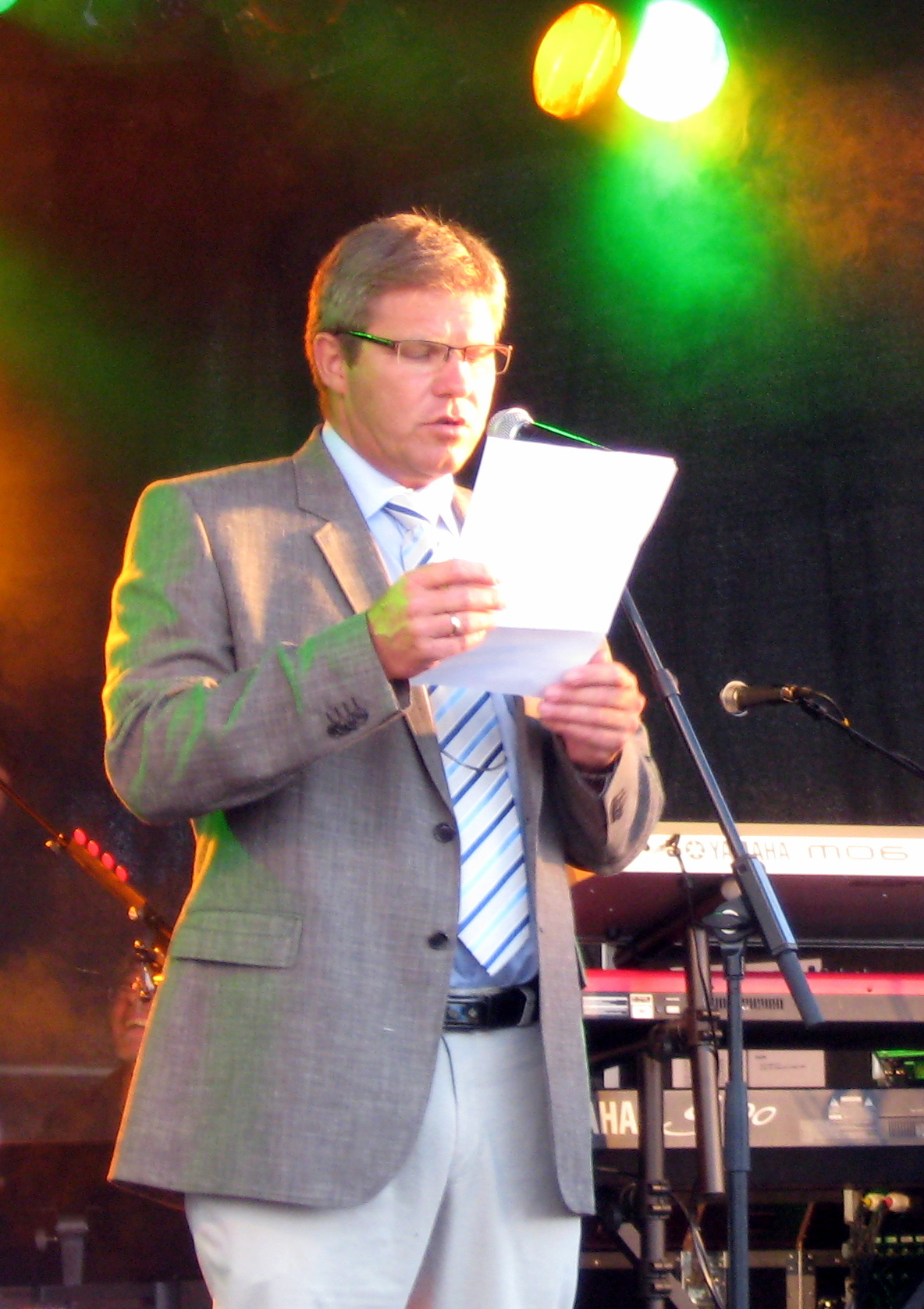 Arne Boelt - en dansk politiker, der siden 2010 har været borgmester i Hjørring Kommune, valgt for Socialdemokraterne.